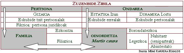 Zuzenbide zibila: bere edukiaren eskema